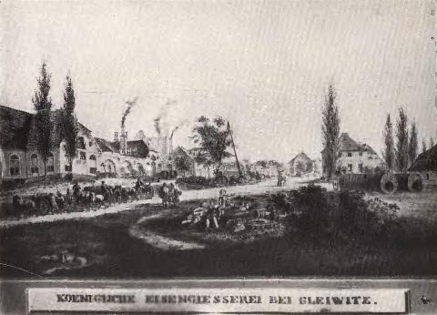 Königliche Eisengießerei in Gleiwitz, Litographie von Knippel 1840